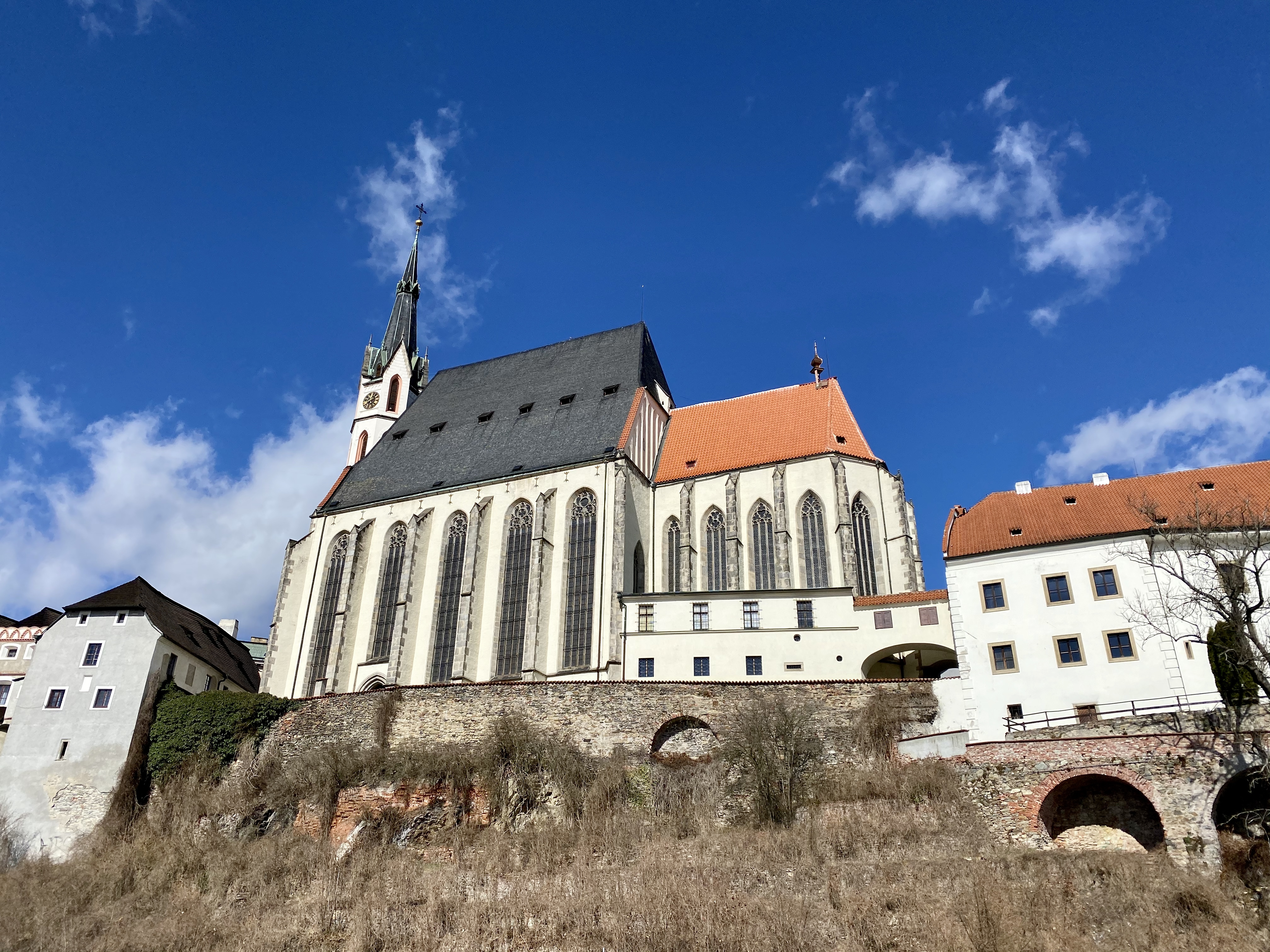 Kostel sv. Víta v Českém Krumlově